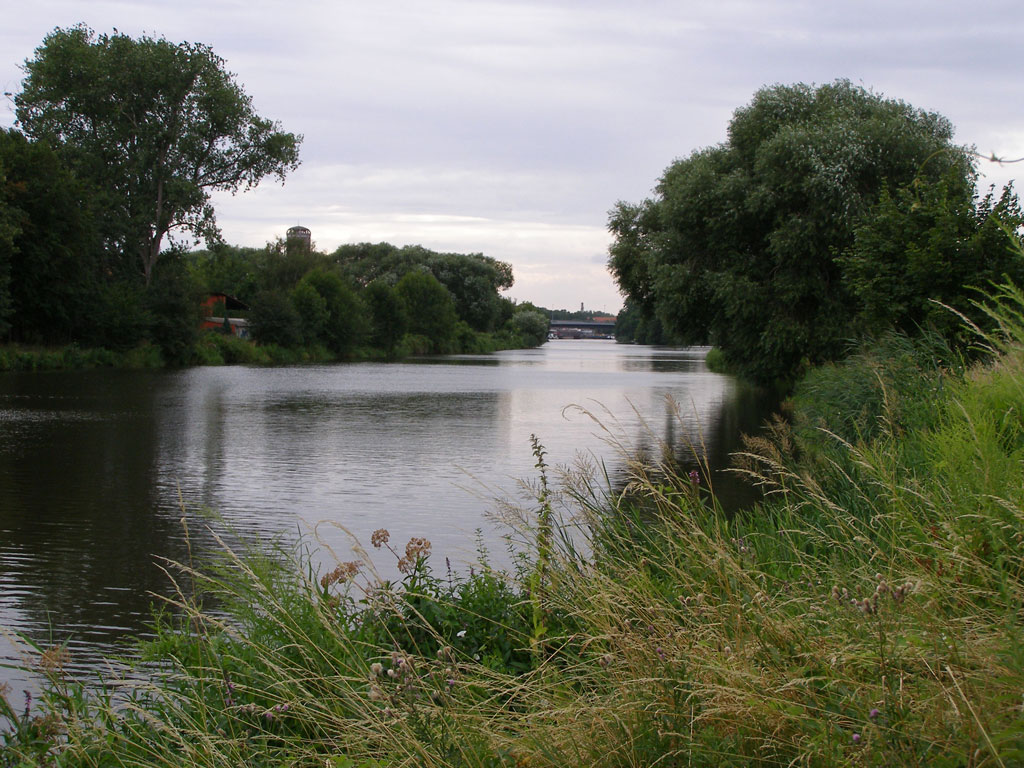 Elb-Havel-Kanal in Genthin, Richtung Westen